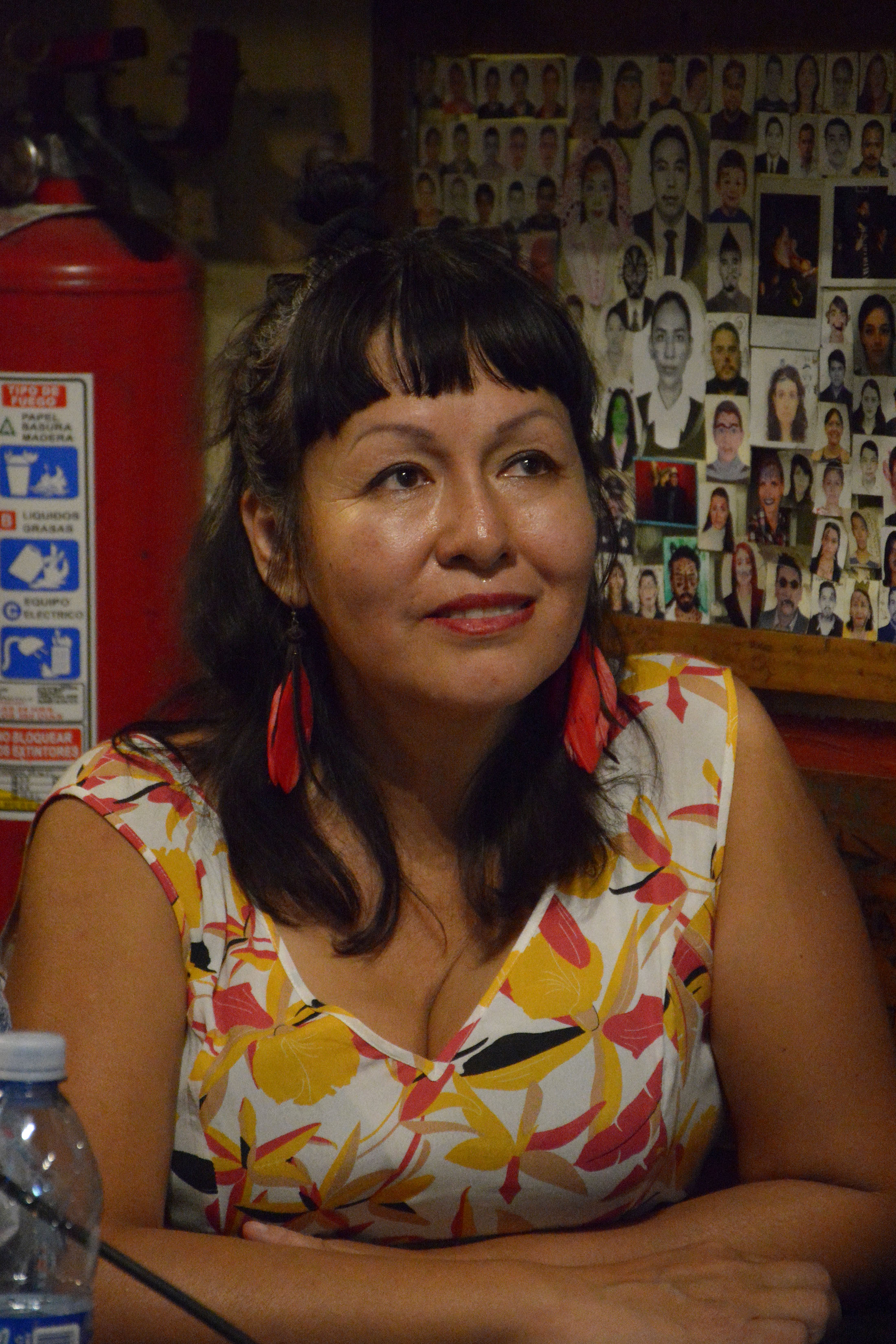 Martes 16 de octubre de 2018. En la Hostería la Bota se realizó la Charla-homenaje a Eliseo Diego que contó con la presencia de los poetas Rosana Crisologo Correa de Perú, América Merino de Chile, Rodolfo Alpízar de Cuba, Héctor Iván González, Manuel Cuautle y Gerardo Grande de México. Fotografía: Raúl Sagala / Secretaría de Cultura CDMX.